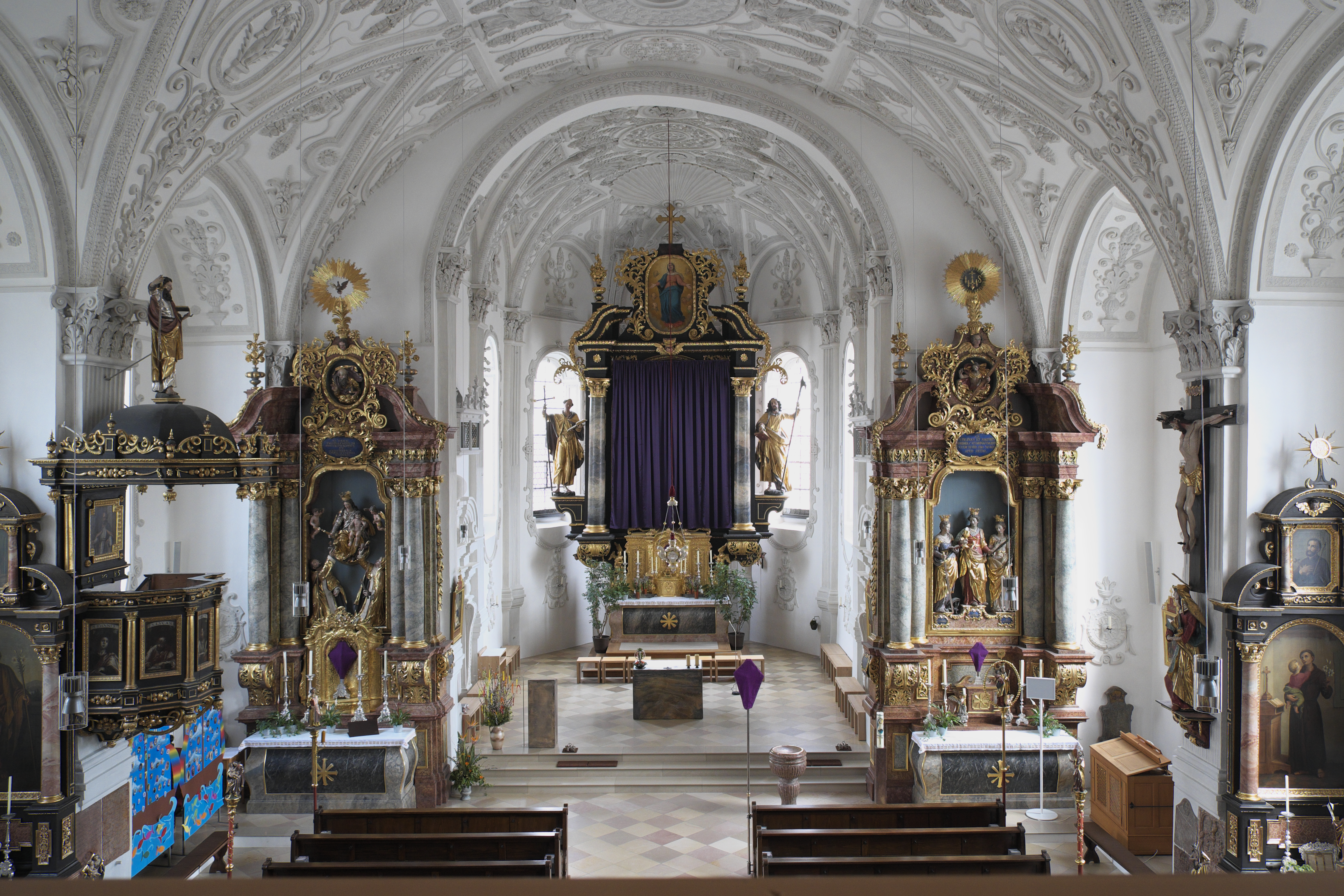 Katholische Pfarrkirche St. Margaret (Markt Schwaben) in Markt Schwaben im Landkreis Ebersberg (Bayern/Deutschland), Innenraum